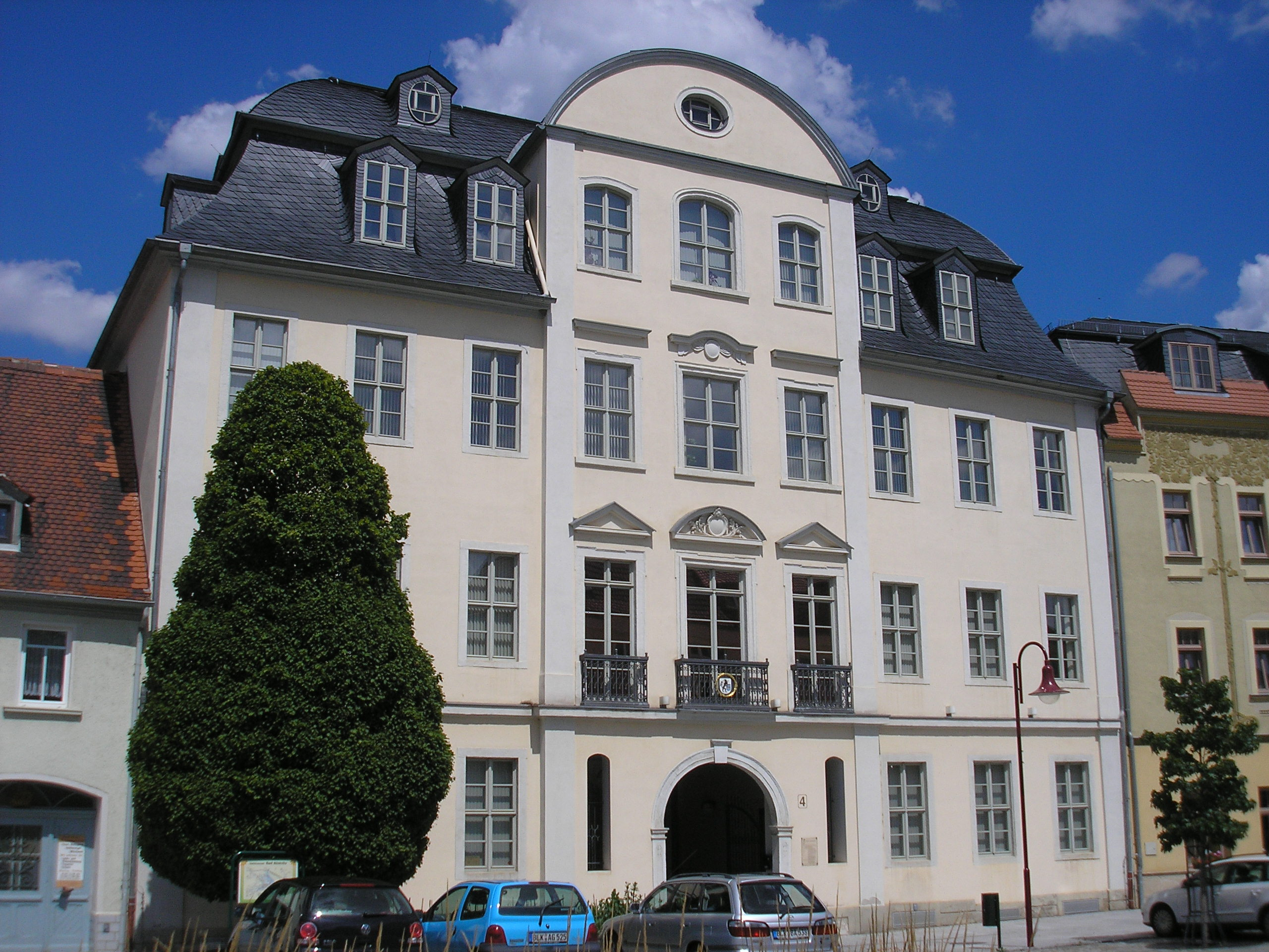 Das Palais in Bad Köstritz (Thüringen).